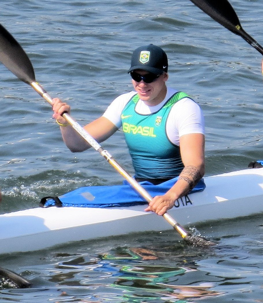 Sx50